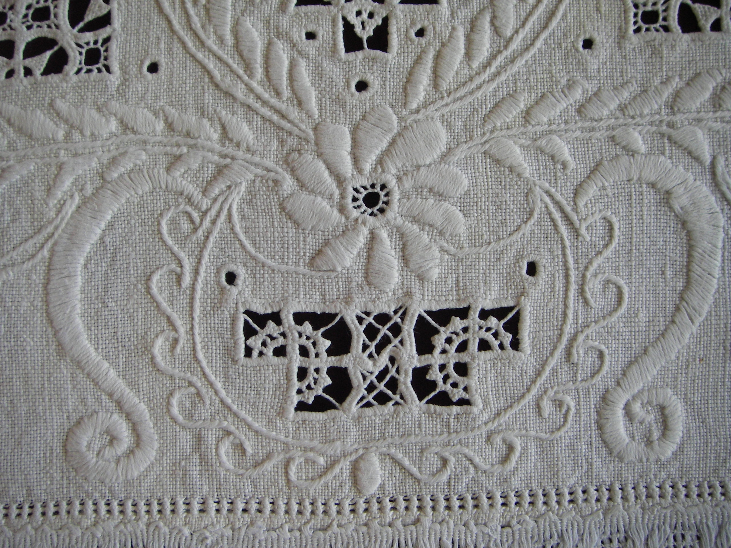 Hedebosyning fra perioden ca. 1835 - 1855